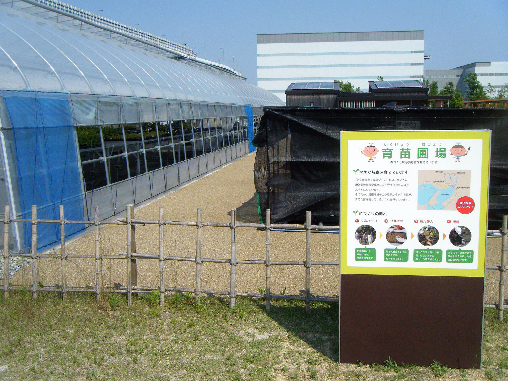 尼崎中央緑地 苗木栽培